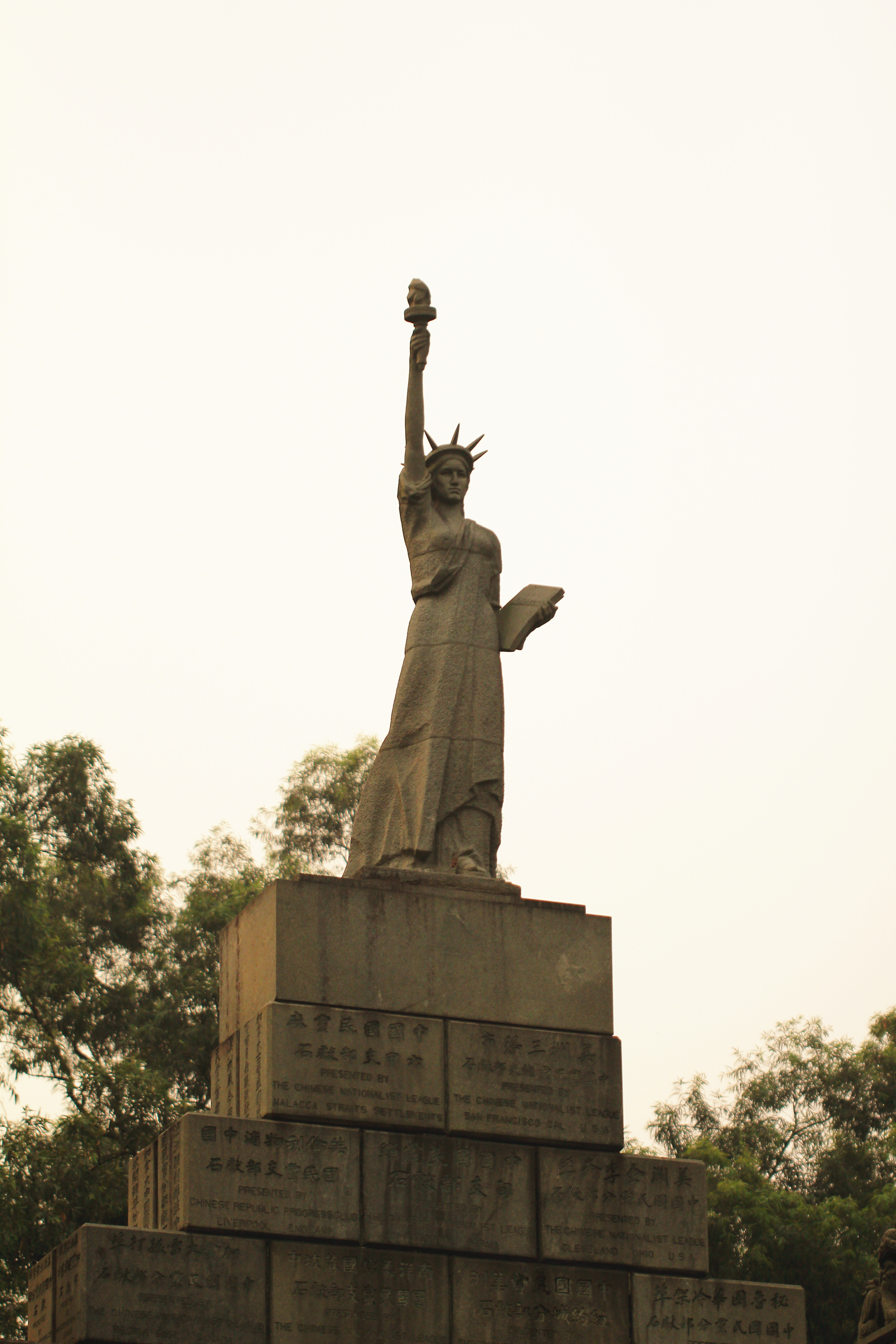 紀功坊自由女神像，立於黃花崗公園。